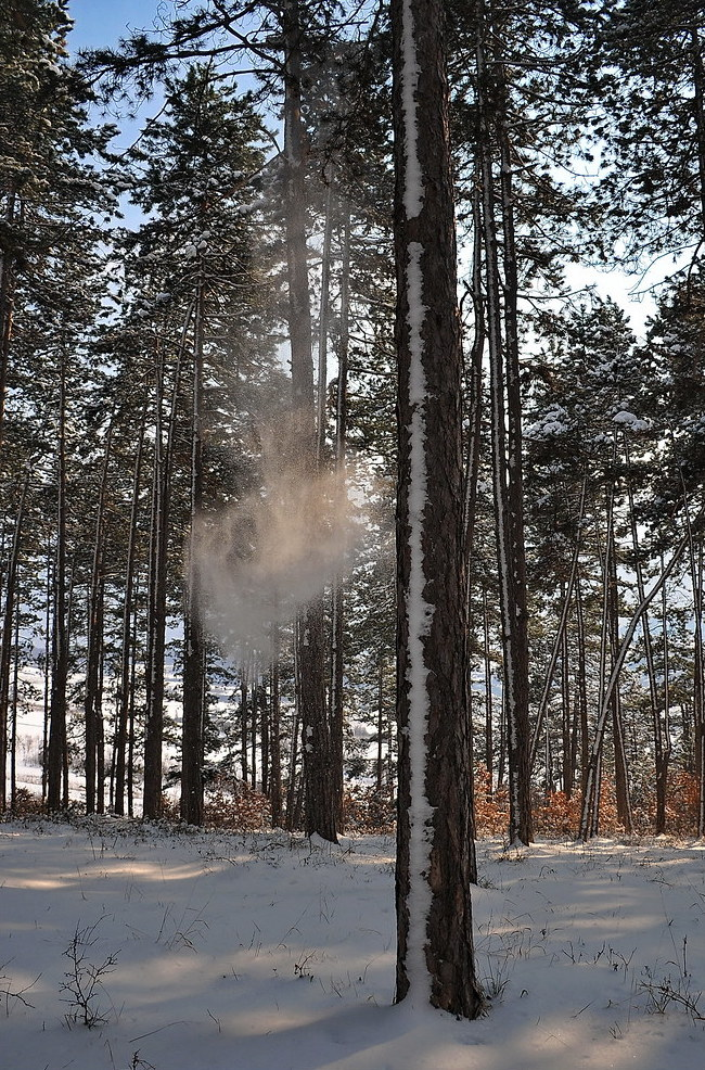 Брдо изнад Књажевца